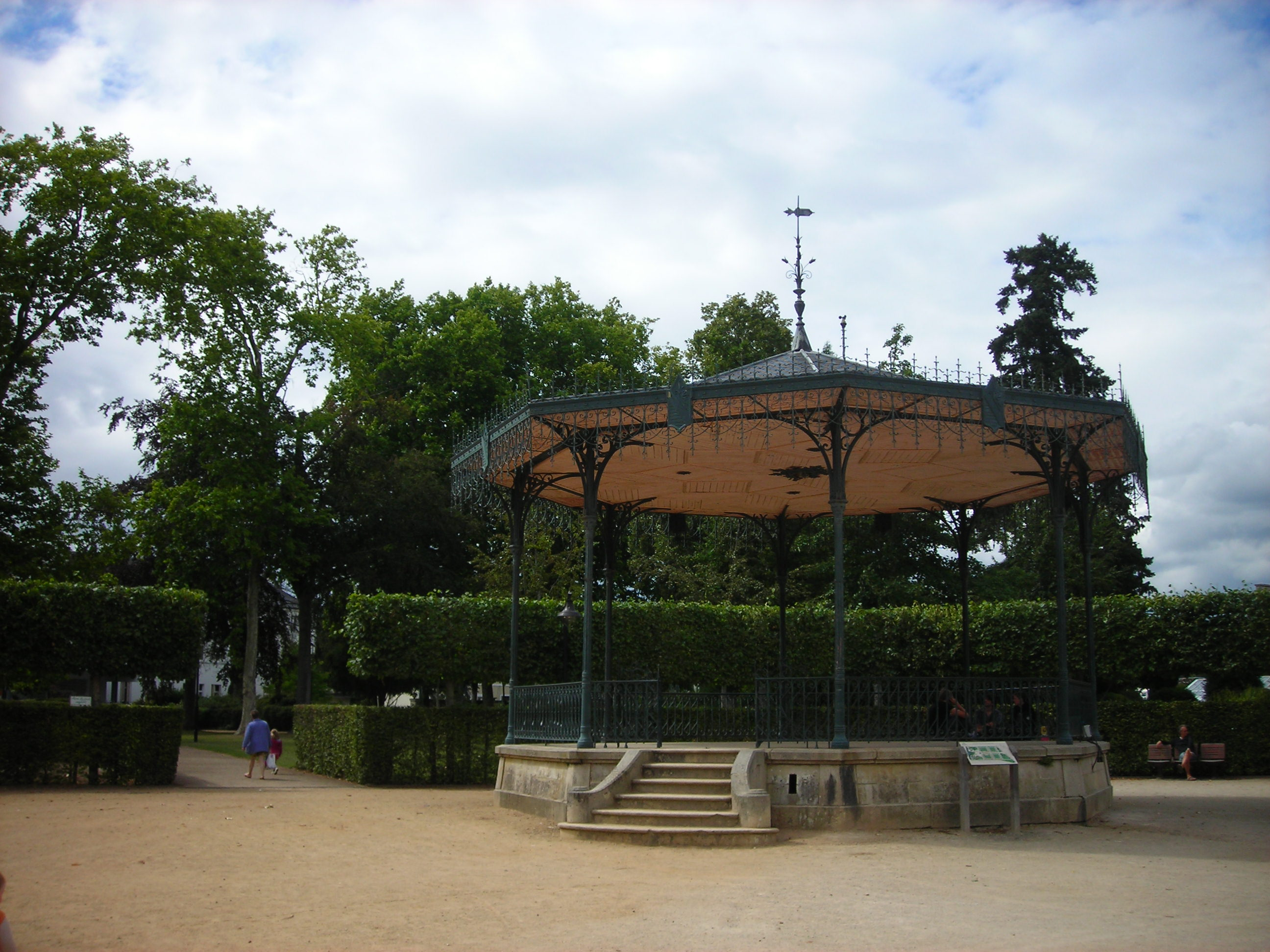 Parc des promenades d’Alençon (Orne, France) _ Kiosque